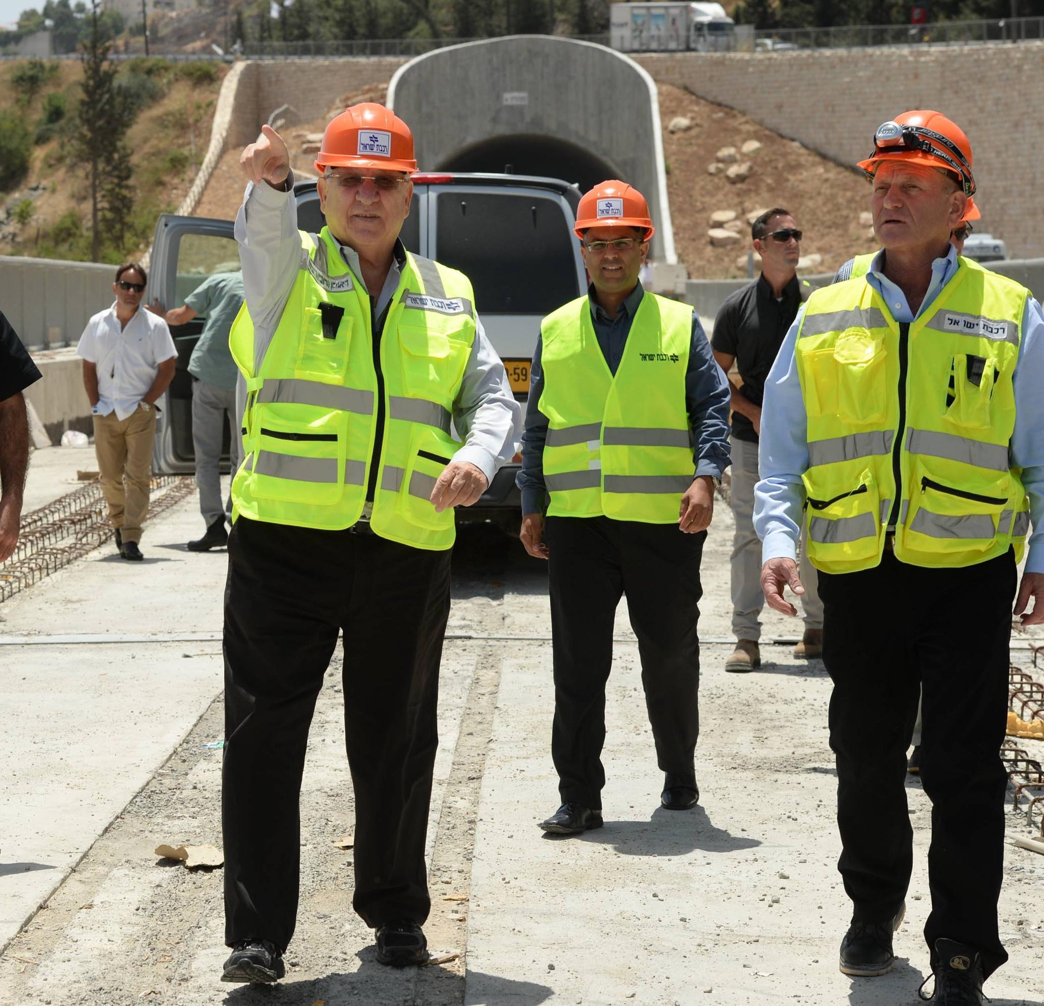 נשיא מדינת ישראל ראובן ריבלין בביקור בנשיא המדינה בתוואי הרכבת המהירה לירושלים